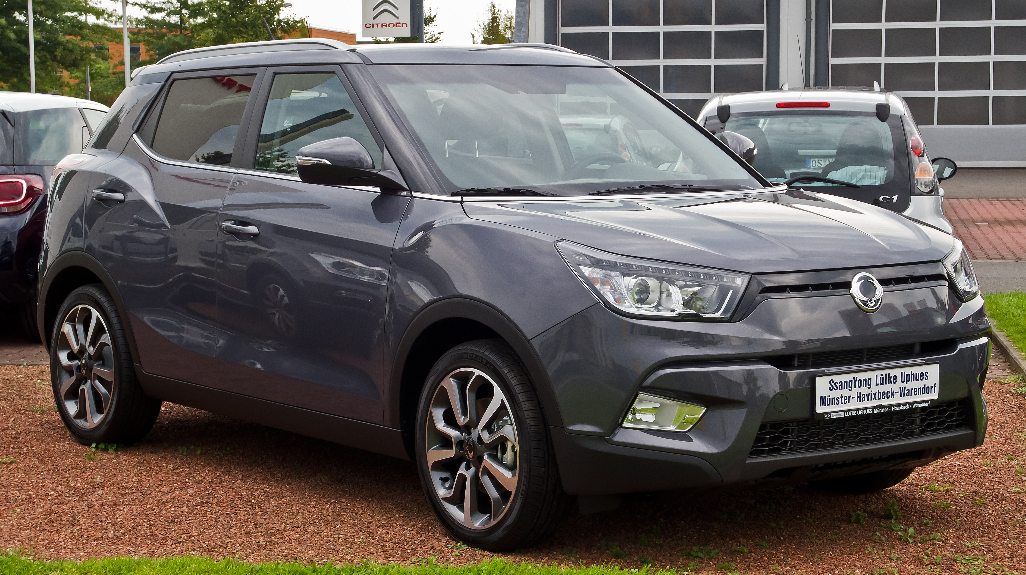 SsangYong Tivoli e-XDi 160 2WD Sapphire